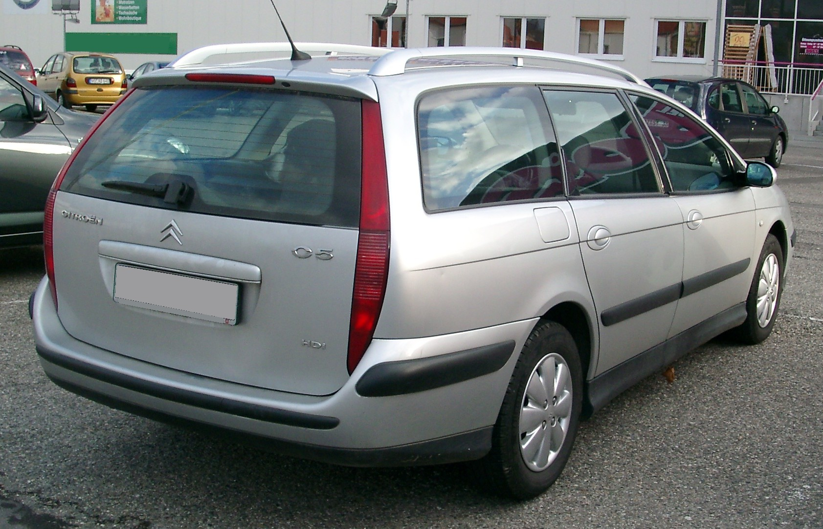 Citroen C5